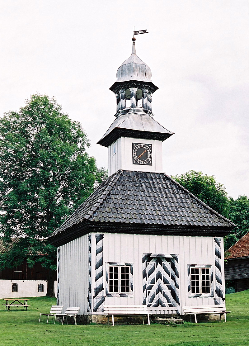 Posthuset, Fossesholm, Vestfossen, Øvre Eiker, Buskerud.